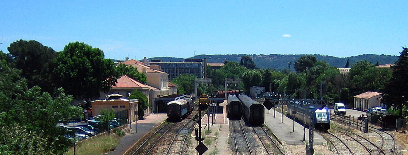 Voie ferrée à Aix-en-Provence (Bouches-du-Rhône). Train, SNCF, chemin de fer, les quais et voies de la Gare historique du centre ville.